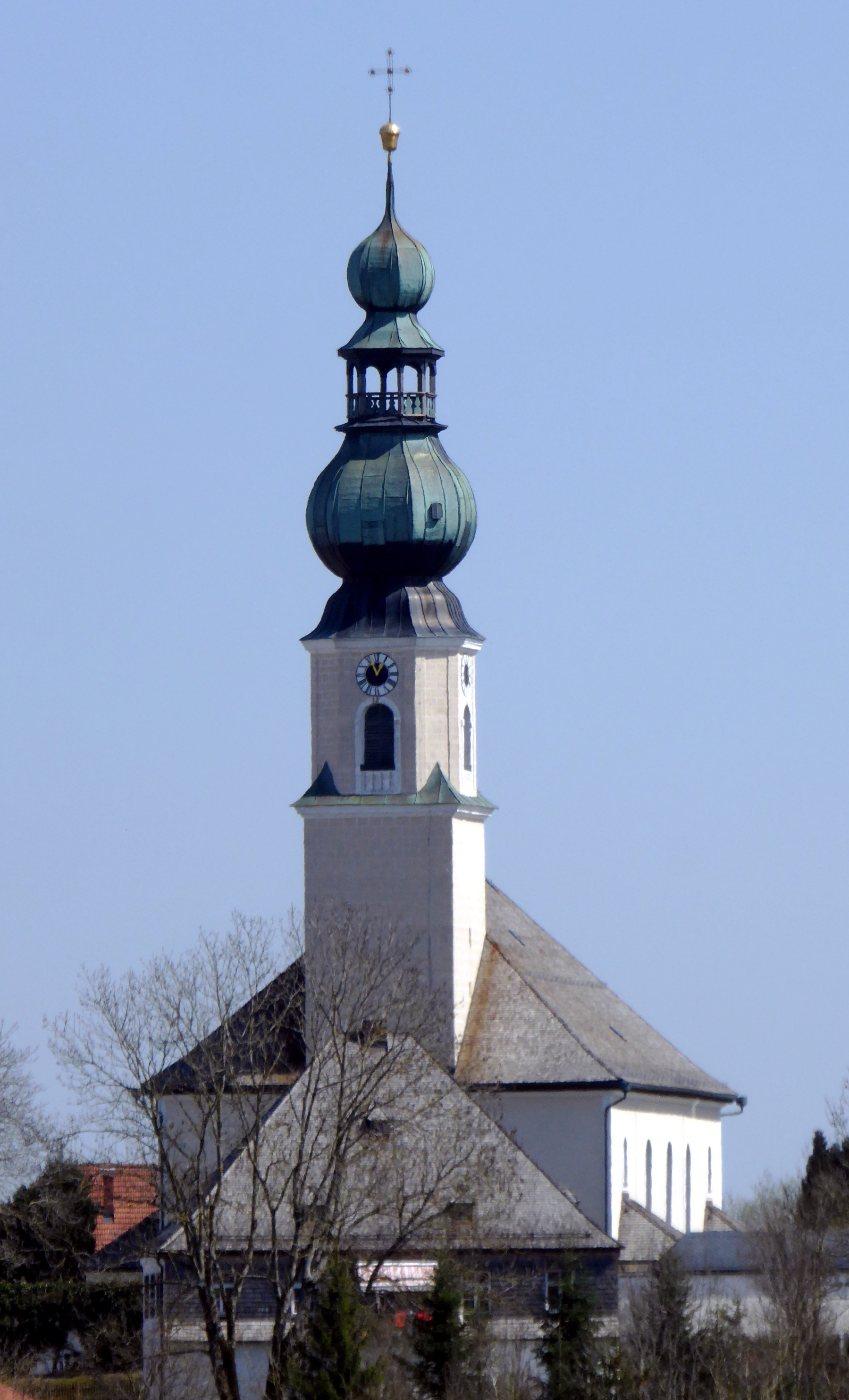 Traunwalchen, Kirche Mariä Geburt von Westen (Matzing) gesehen.